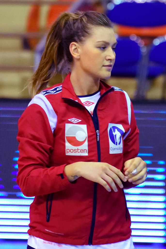 Amanda Kurtovic, arrière droite de l'équipe de Norvège de handball féminin. Le 19 mars 2015 lors du match de Golden League, Norvège / Pologne.